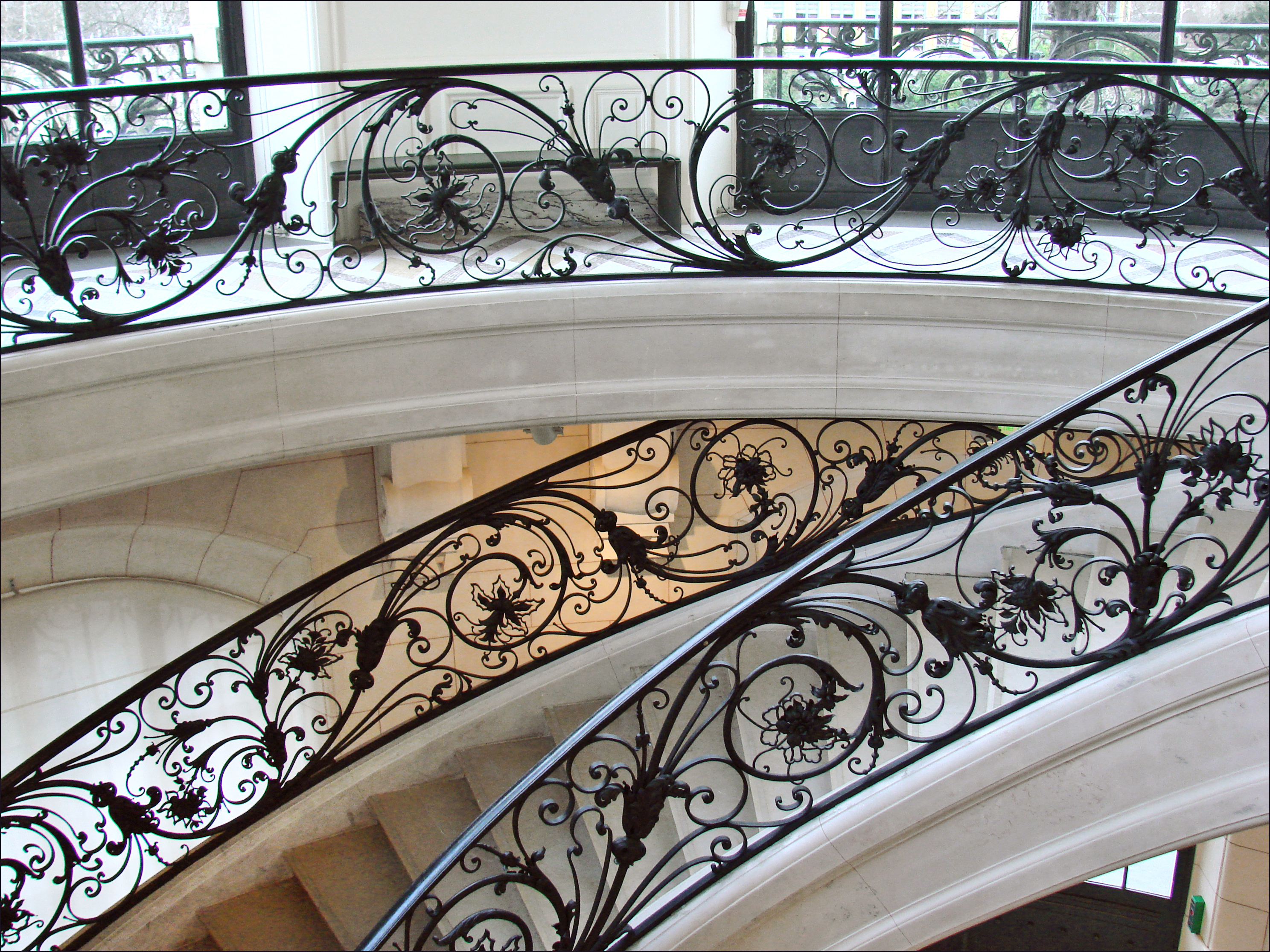 La ferronnerie est un élément majeur du décor dessiné par Charles Girault, l'architecte du Petit Palais. Si la grille de la porte d’entrée est très connue, les rampes des escaliers intérieurs des deux rotondes méritent aussi l'attention. Ce sont des oeuvres de ferronnerie d'une qualité exceptionnelle, dont le style est assez loin de l'art nouveau, hormis par les détails floraux très raffinés qu'elles recèlent. Photo Annie Dalbéra voir les ferronneries de Majorelle Site du Petit Palais